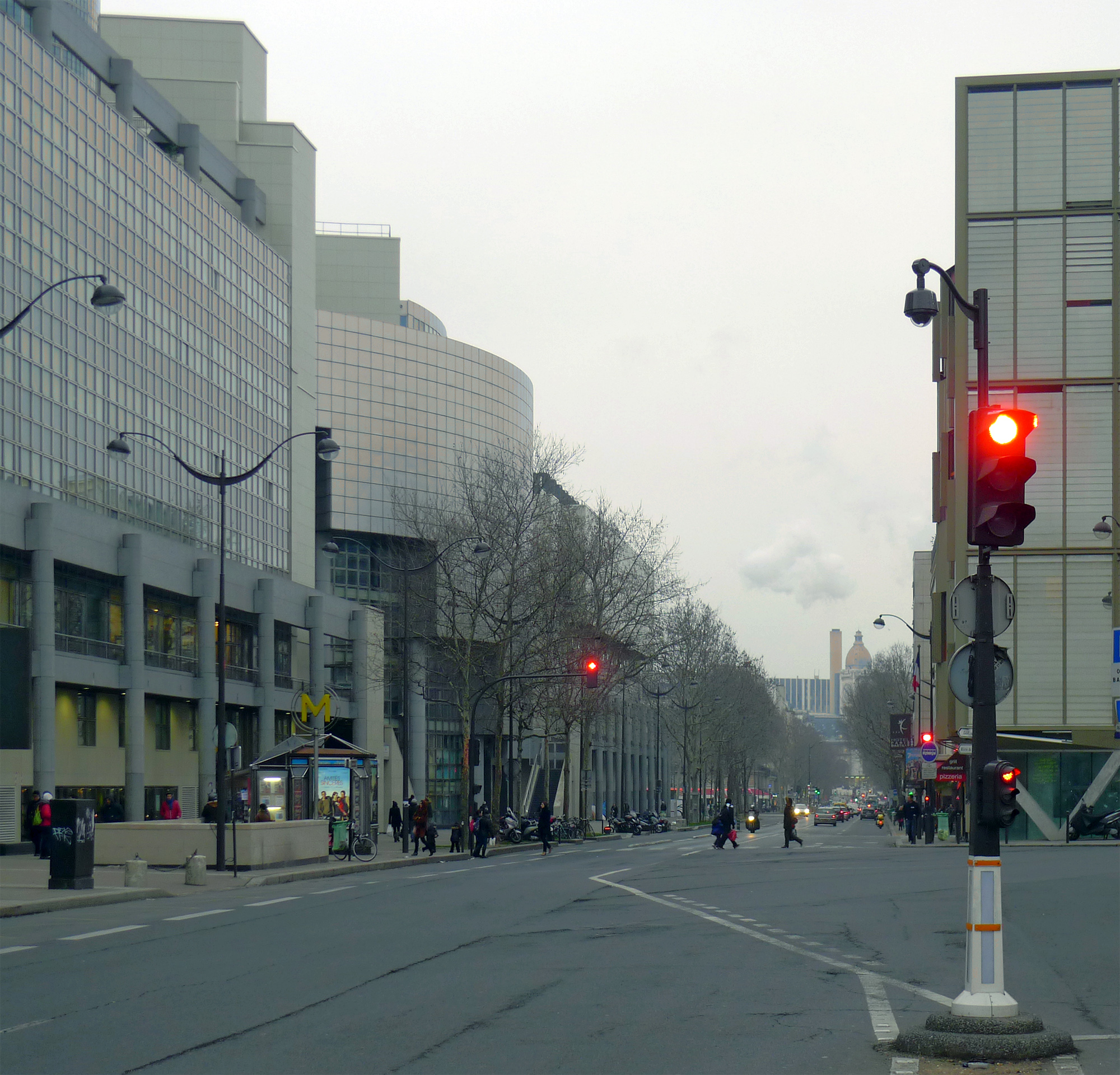 Rue de Lyon - Paris XII